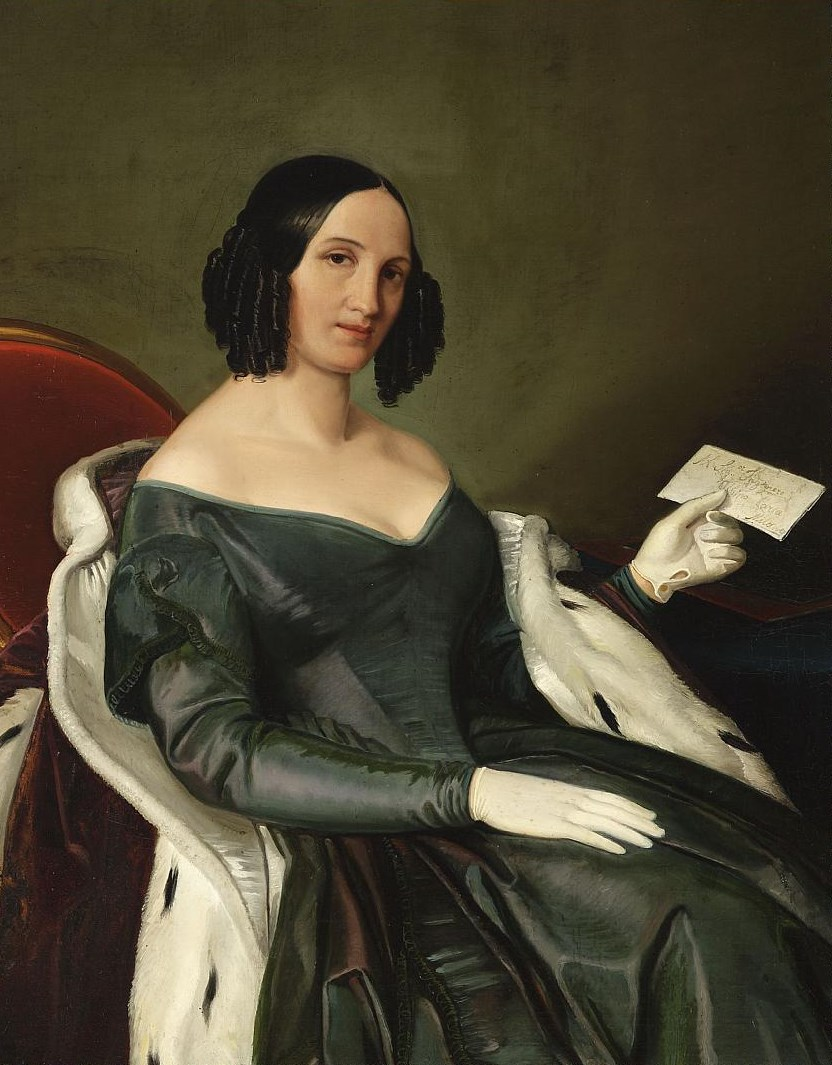 Pietro Racchetti, presunto ritratto della moglie di Albino Parea, olio su tela, collocazione ignota